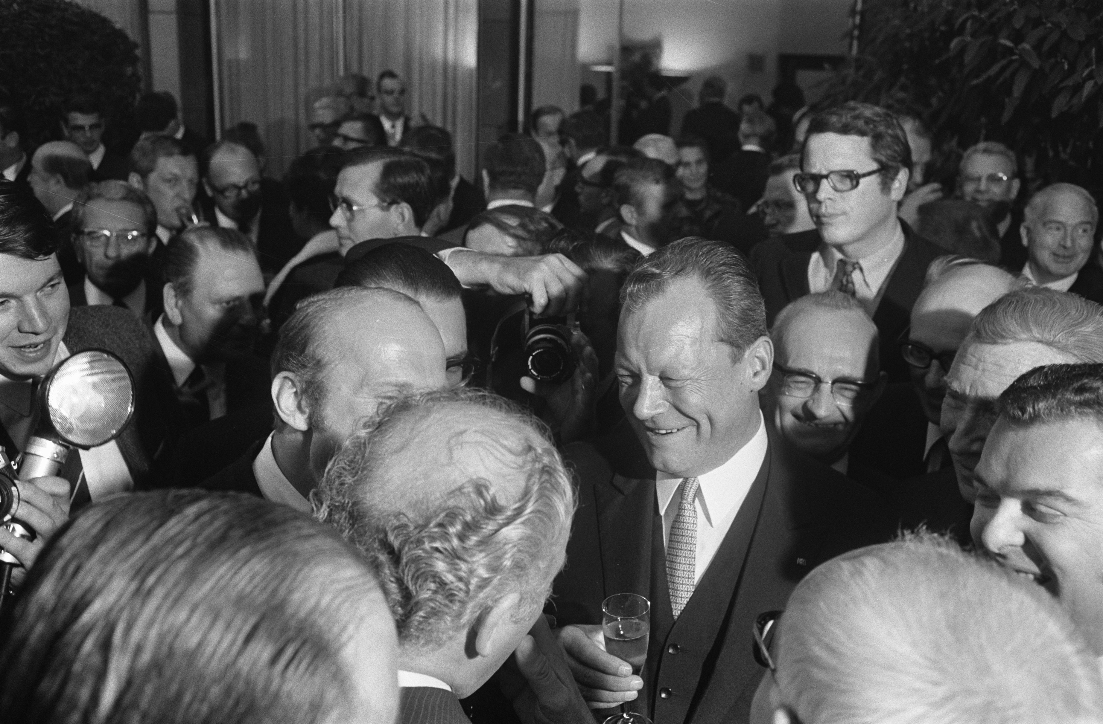 Collectie / Archief : Fotocollectie Anefo Reportage / Serie : [ onbekend ] Beschrijving : Willy Brandt (SPD) gekozen tot bondskanselier van West- Duitsland te Bonn Datum : 21 oktober 1969 Locatie : Bonn, Duitsland Trefwoorden : bondskanseliers Persoonsnaam : Brandt, Willy Instellingsnaam : SPD Fotograaf : Koch, Eric / Anefo Auteursrechthebbende : Nationaal Archief Materiaalsoort : Negatief (zwart/wit) Nummer archiefinventaris : bekijk toegang 2.24.01.05 Bestanddeelnummer : 922-8911